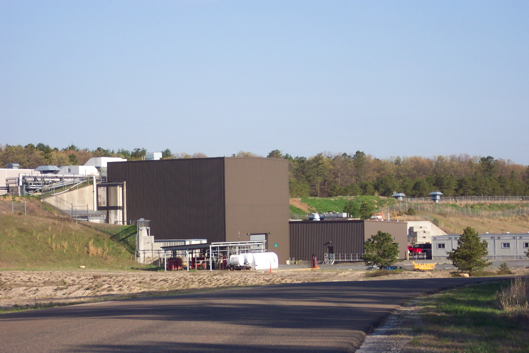 PHENIX experimental hall outside view